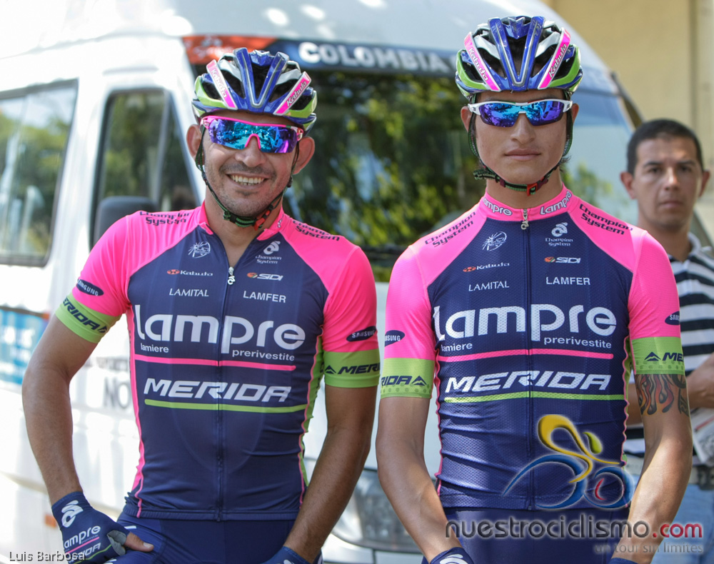 José Serpa & Winner Anacona en la 1° etapa del Tour de San Luis 2014